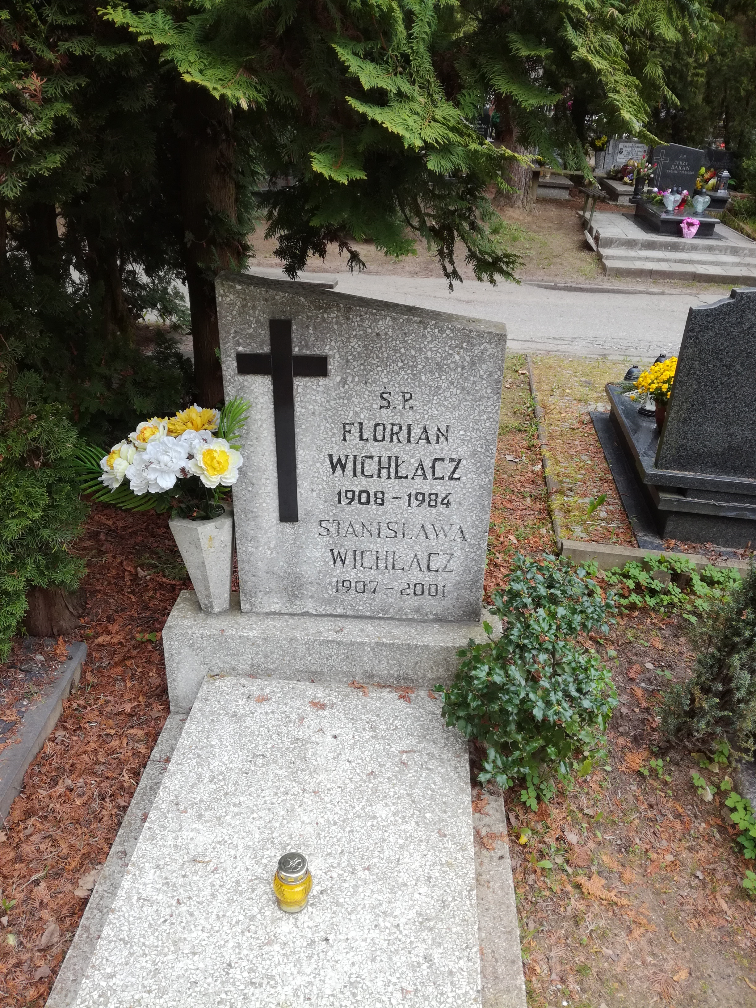 Grób nauczyciela i polityka Floriana Wichłacza (ur. 1908, zm. 1984) na Cmentarzu Łostowickim.